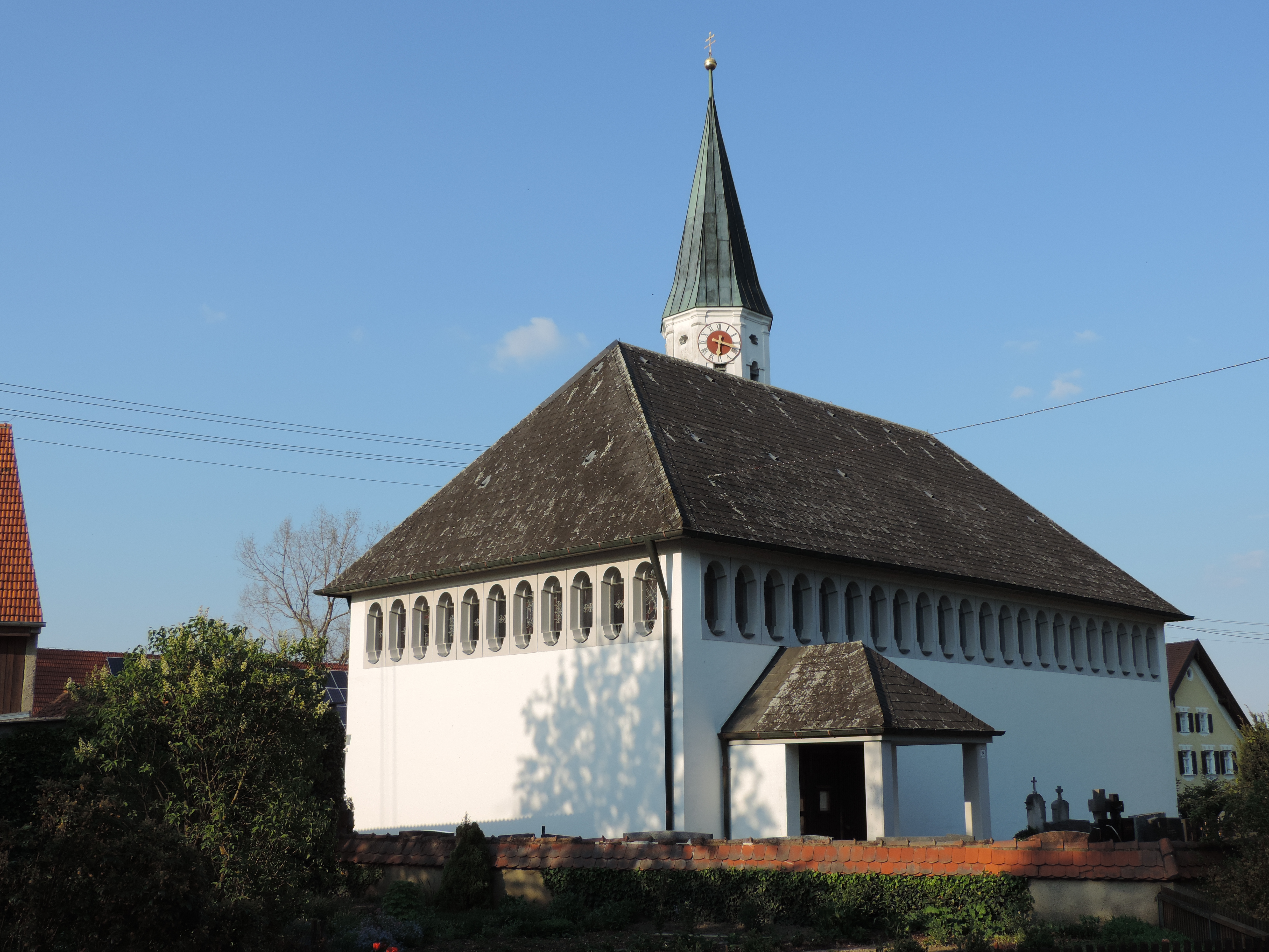 1959/60, Turm 17. Jahrhundert; mit Ausstattung.